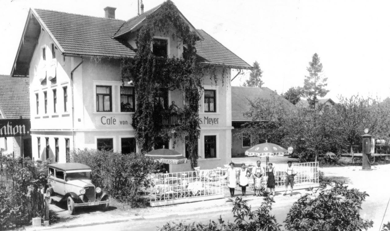 Café Meyer im Jahre 1930, erbaut 1896, Münchner Straße in Sauerlach